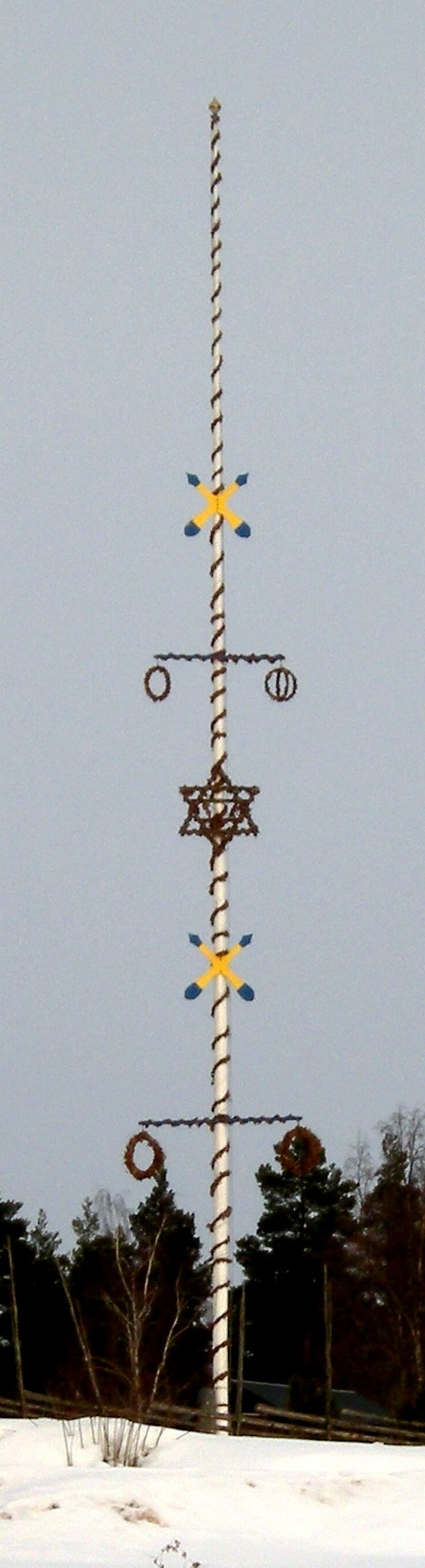 Majstång i Siljansnäs vintertid.